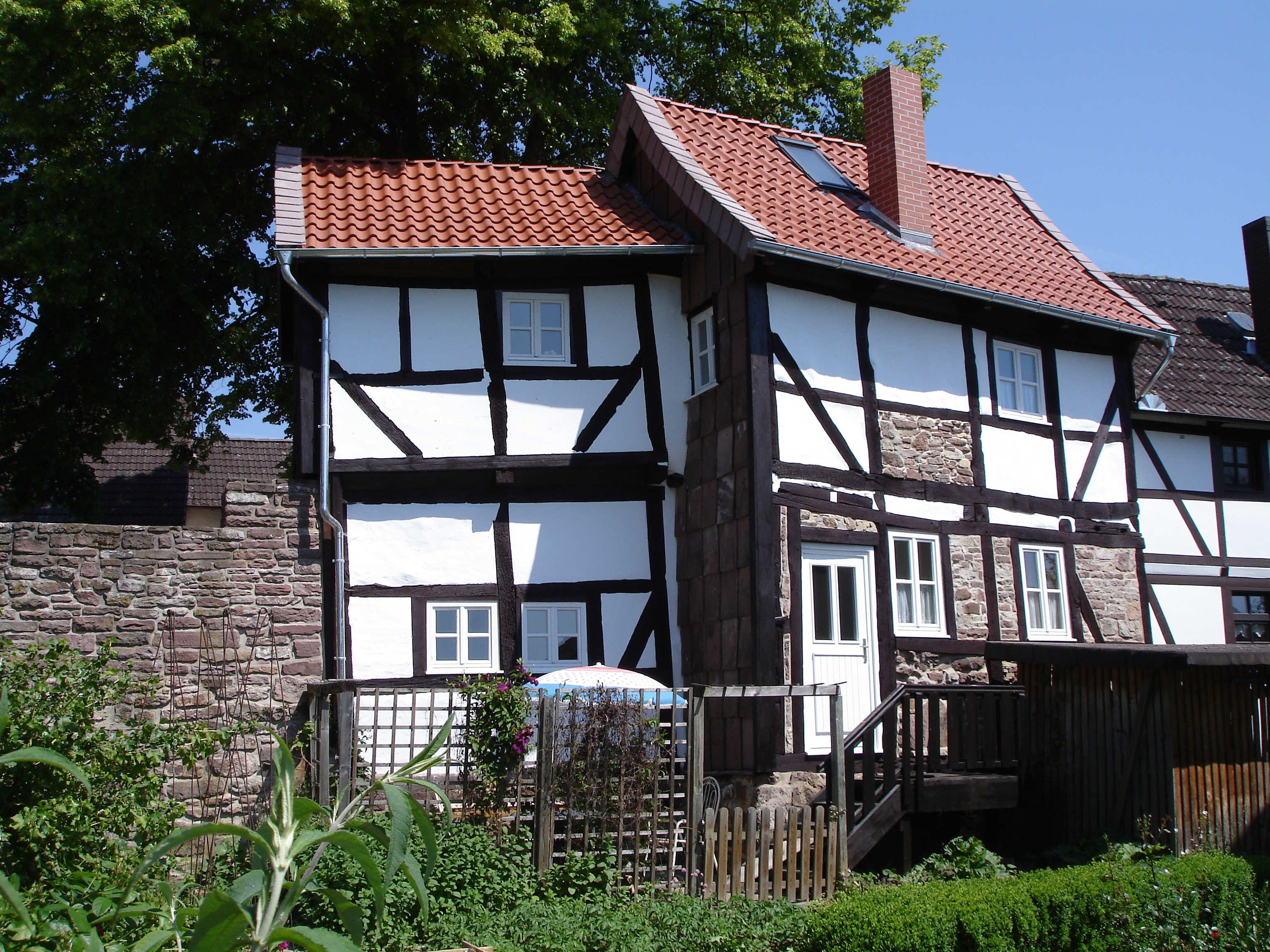 Die Stadt Dassel erhielt im 14. Jhd die Stadtrechte und baute zwischen 1350 und 1400 eine Stadtmauer mit insgesamt 7 Türmen. Von diesen sind heute nur noch zwei als Fundamente erhalten, von denen einer, der Balderturm an der Südseite der Stadt heute in diese Fachwerkhaus integriert ist. Im Inneren des Hauses befindet sich noch eine Wand Brandspuren der Belagerung durch Tilly im 30jährigen Krieg mit Schießscharte. Das Haus steht zusammen mit dem Nebenhaus unter Denkmalschutz und wird als Ferienhaus genutzt. Weitere Informationen und Bilder auch unter oder